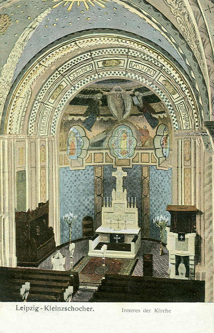 Postcard, 1917. Title: "Leipzig - Kleinzschocher. Inneres der Kirche".